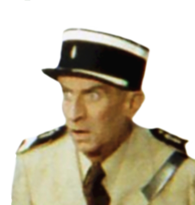 Louis de Funès lors du tournage de la série télévisée "Le gendarme et les extra-terrestres"